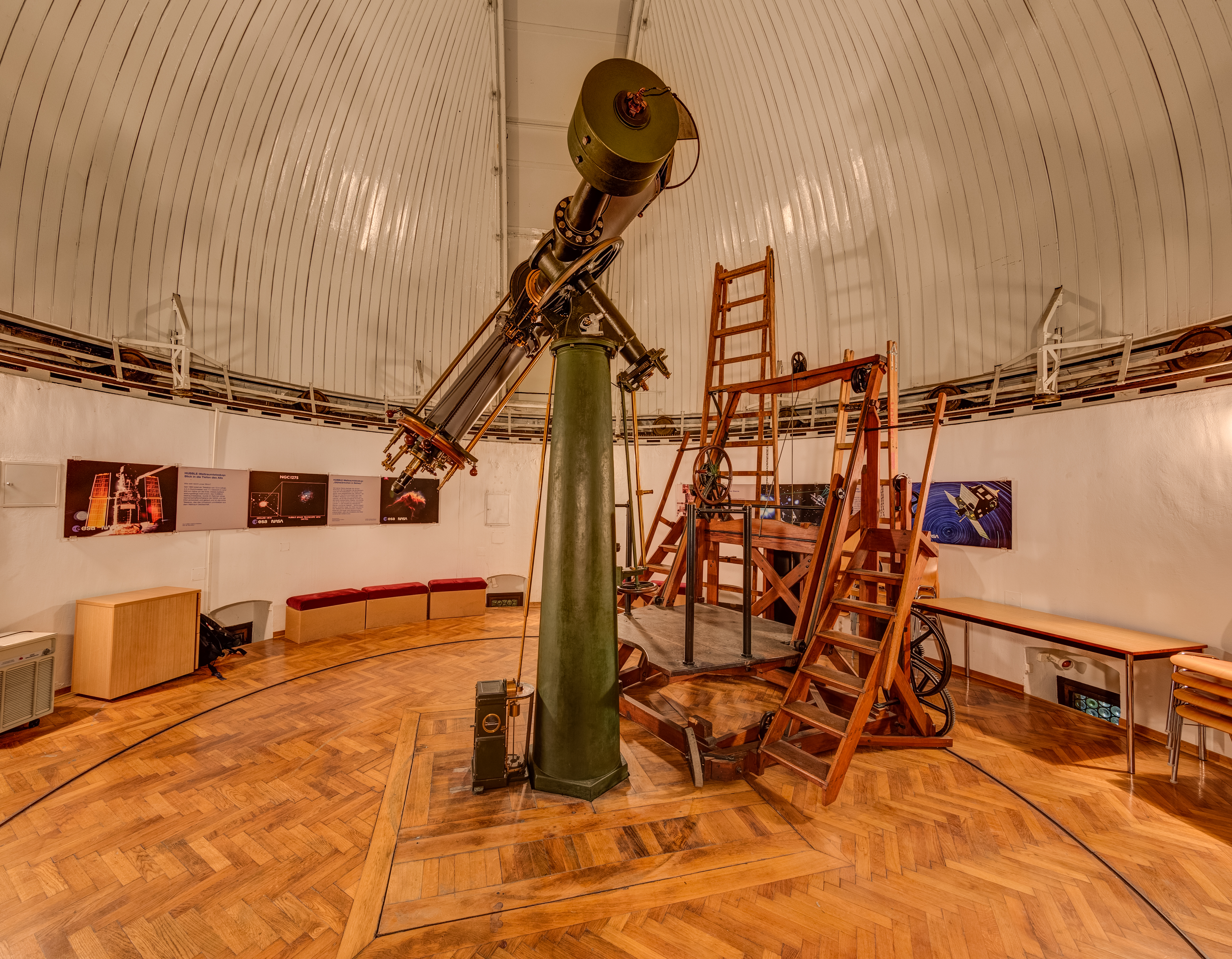 Kuffner Sternwarte, Wien, Das Heliometer Ursprüngliche technische Daten Objektivdurchmesser: 21,7cm Objektivbrennweite: 300cm Montierung: Deutsche parallaktische Montierung Nachführung: Uhrwerkantrieb Baujahr: 1893 Historische Bedeutung Das Heliometer der Kuffner-Sternwarte war ursprünglich ein Meßinstrument, mit dem sehr kleine Winkel gemessen werden konnten. Von dieser sehr seltenen Gerätegattung ist es das größte der Welt! Haupteinsatzgebiet war die Messung von Fixsternparallaxen, also die Ermittlung von Entfernungen von Fixsternen. Die Optik stammt wieder von Steinheil, München, die Mechanik von Repsold & Söhne, Hamburg. Das Heliometer wurde 1893 geliefert und 1896 in Betrieb genommen., This image was uploaded as part of European Science Photo Competition 2015.